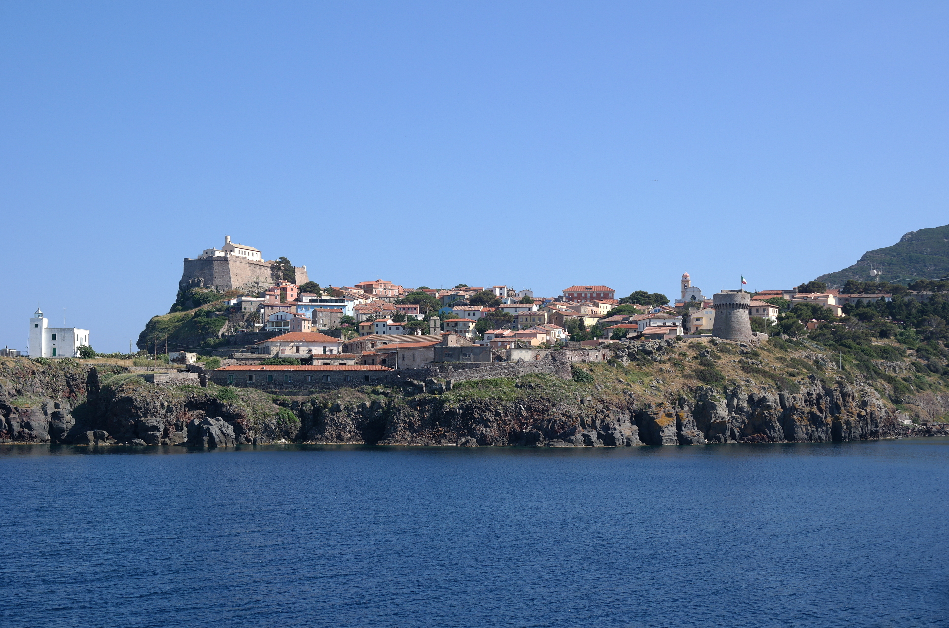 Panorama di Capraia Isola dal traghetto